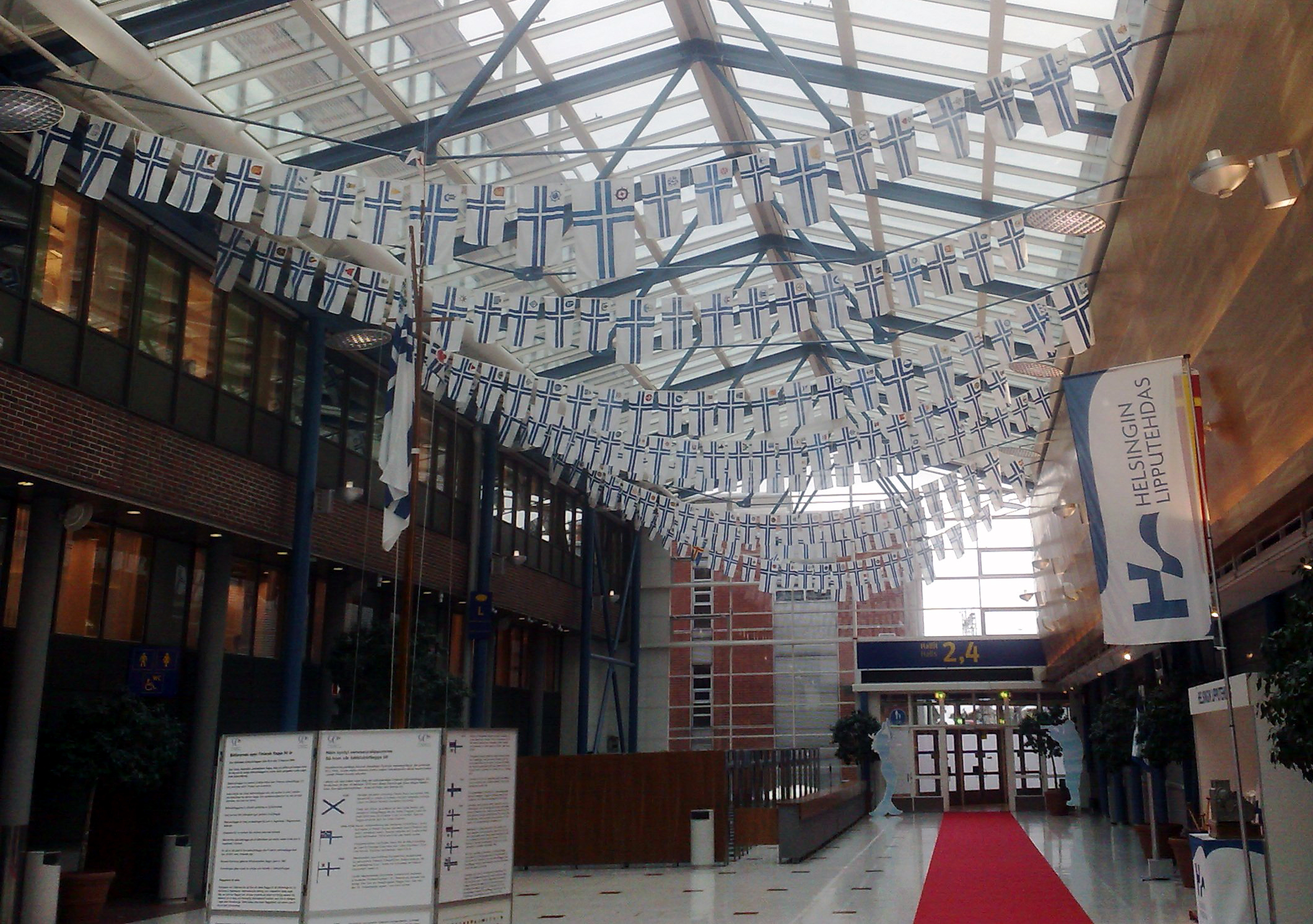 Veneilyliittojen lipputoimikunnan juhlaripustus pursilipuista VENE2009 -näyttelyssä